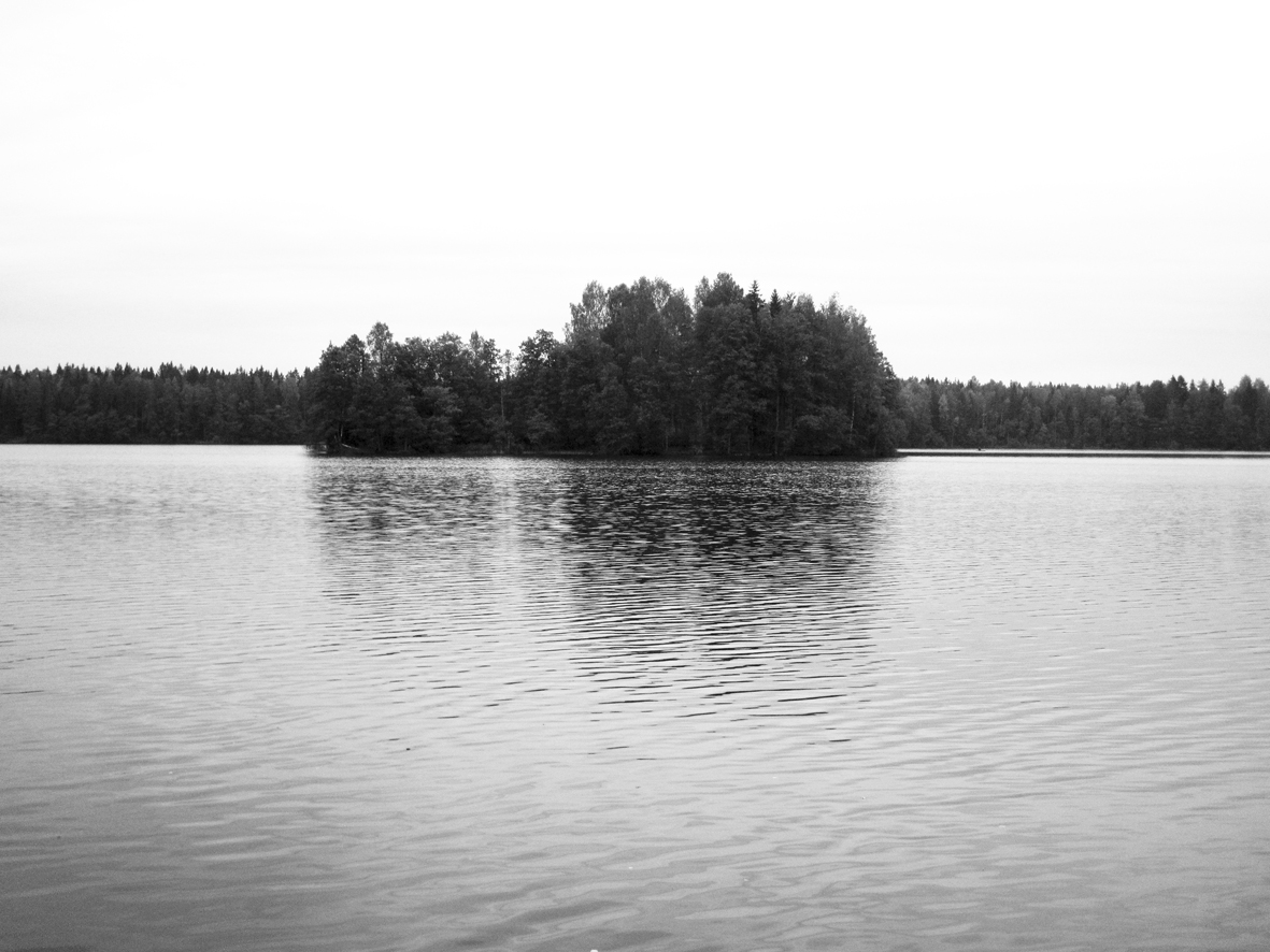 Озеро Малое Кирилловское с островом